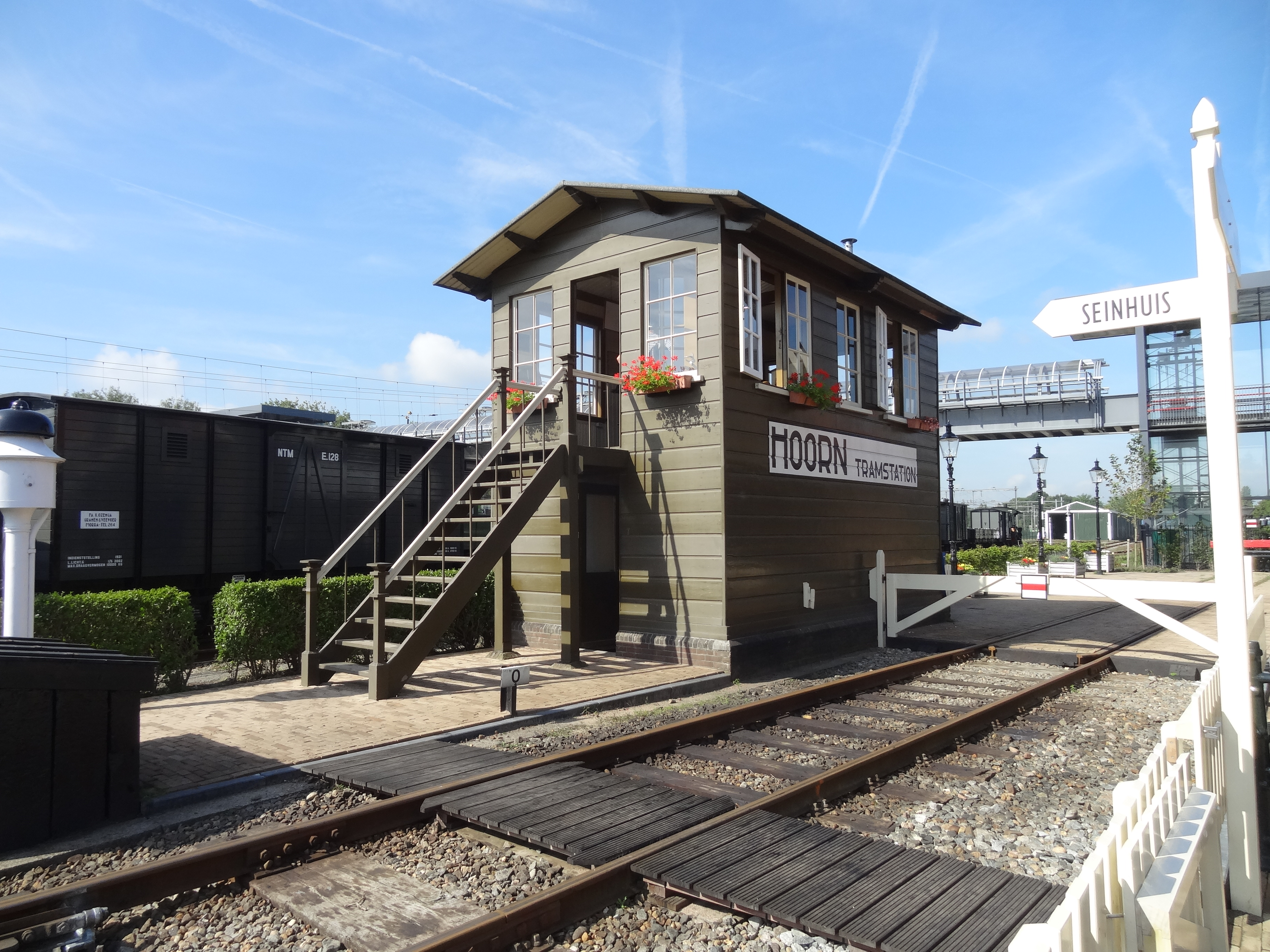 Voormalig seinhuis van station Kesteren, nu seinhuis van de museumstoomtram Hoorn-Medemblik